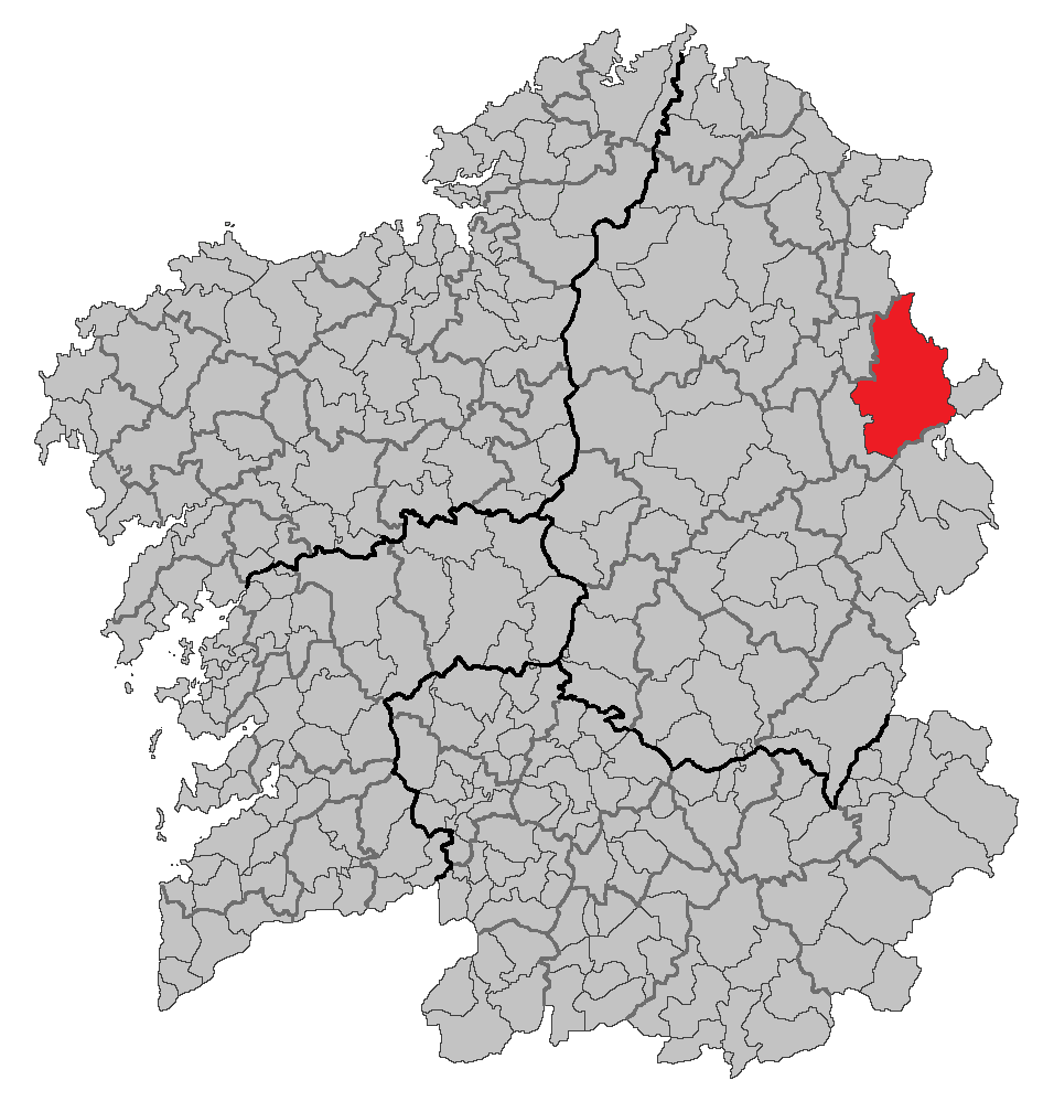 Mapa coa localización do concello de A Fonsagrada.